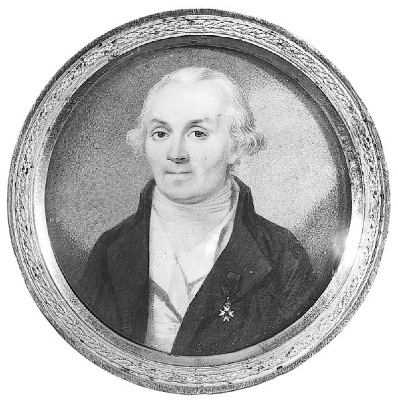 Polismästare Nils Henric Liljensparre 1738-1814